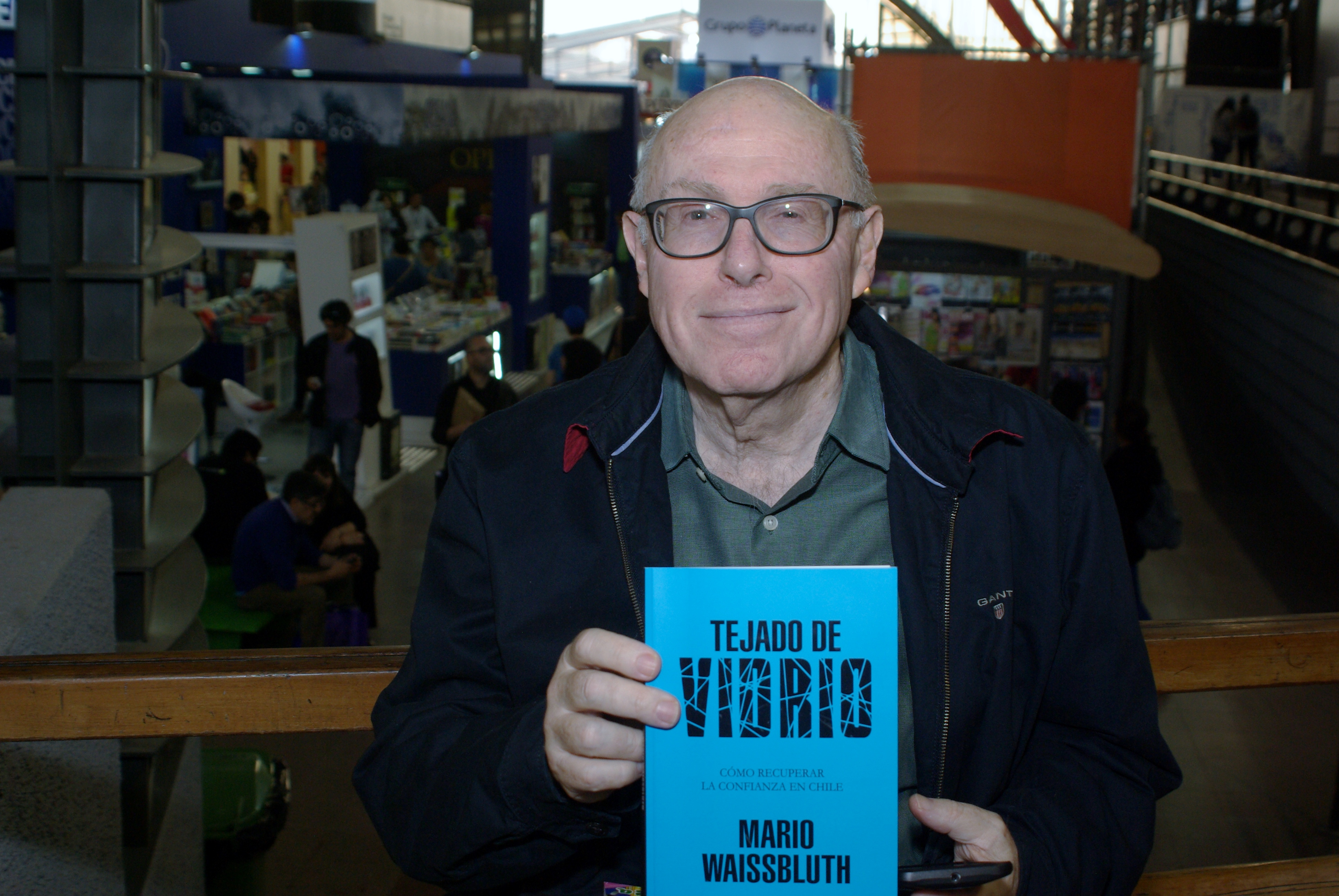 El experto chileno en política educacional Mario Waissbluth en la Feria Internacional del Libro de Santiago 2015